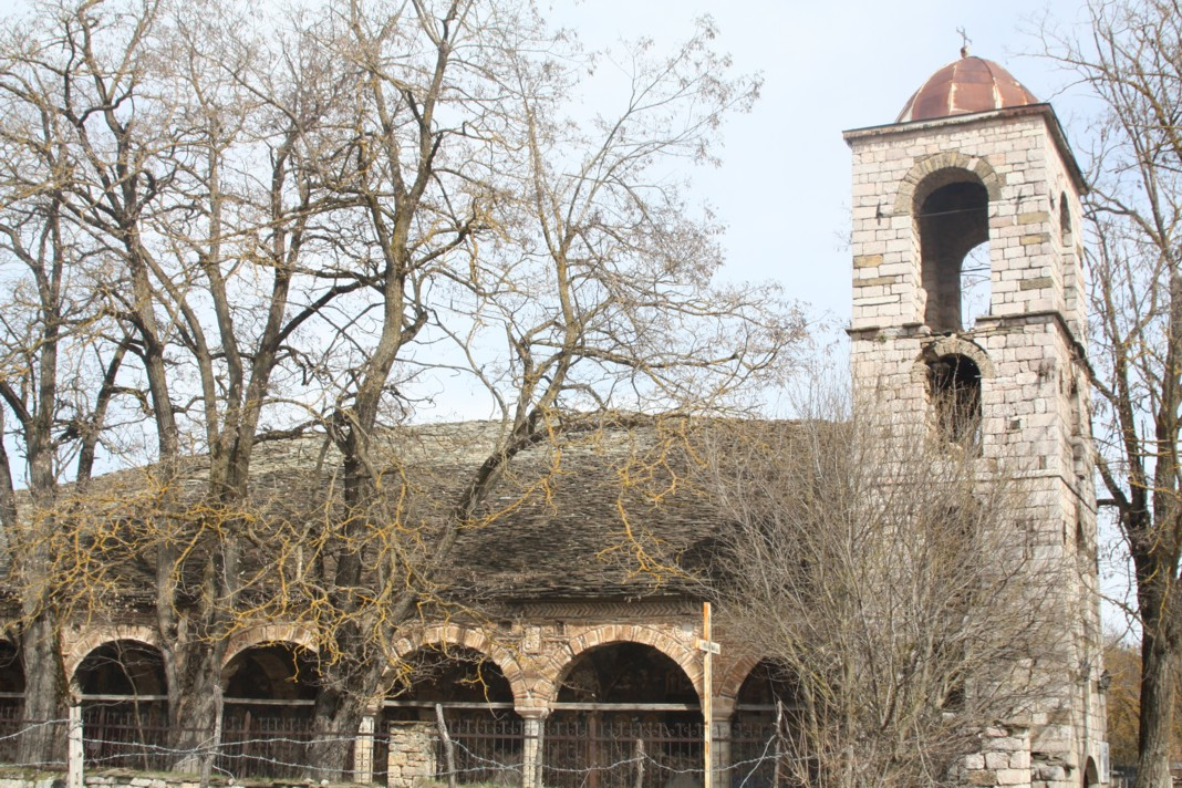 A church in Voskopojë, Albania